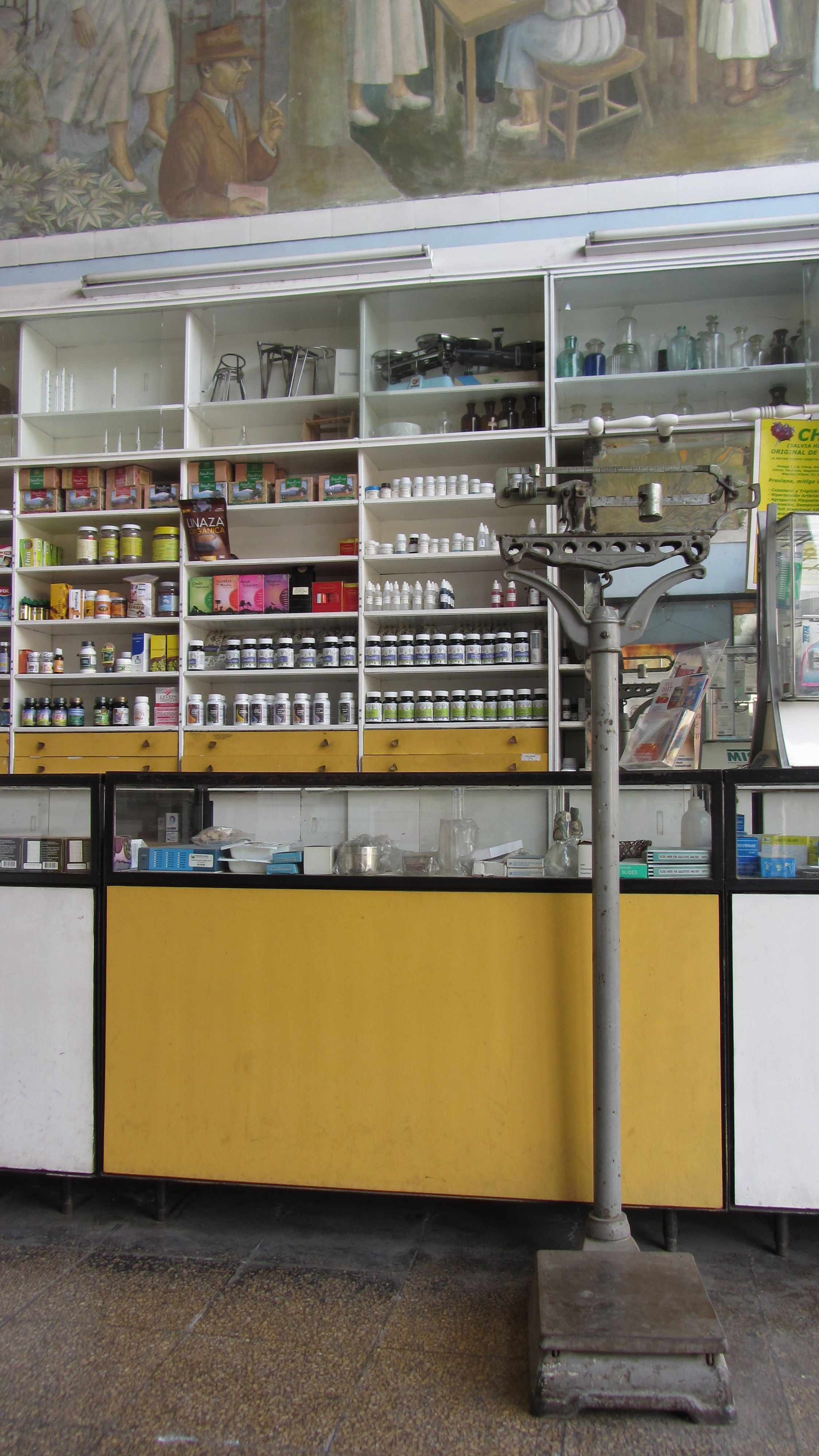 Interior de la antigua Droguería Alemana, antigua Farmacia Maluje, Concepción, Chile. Septiembre de 2012.